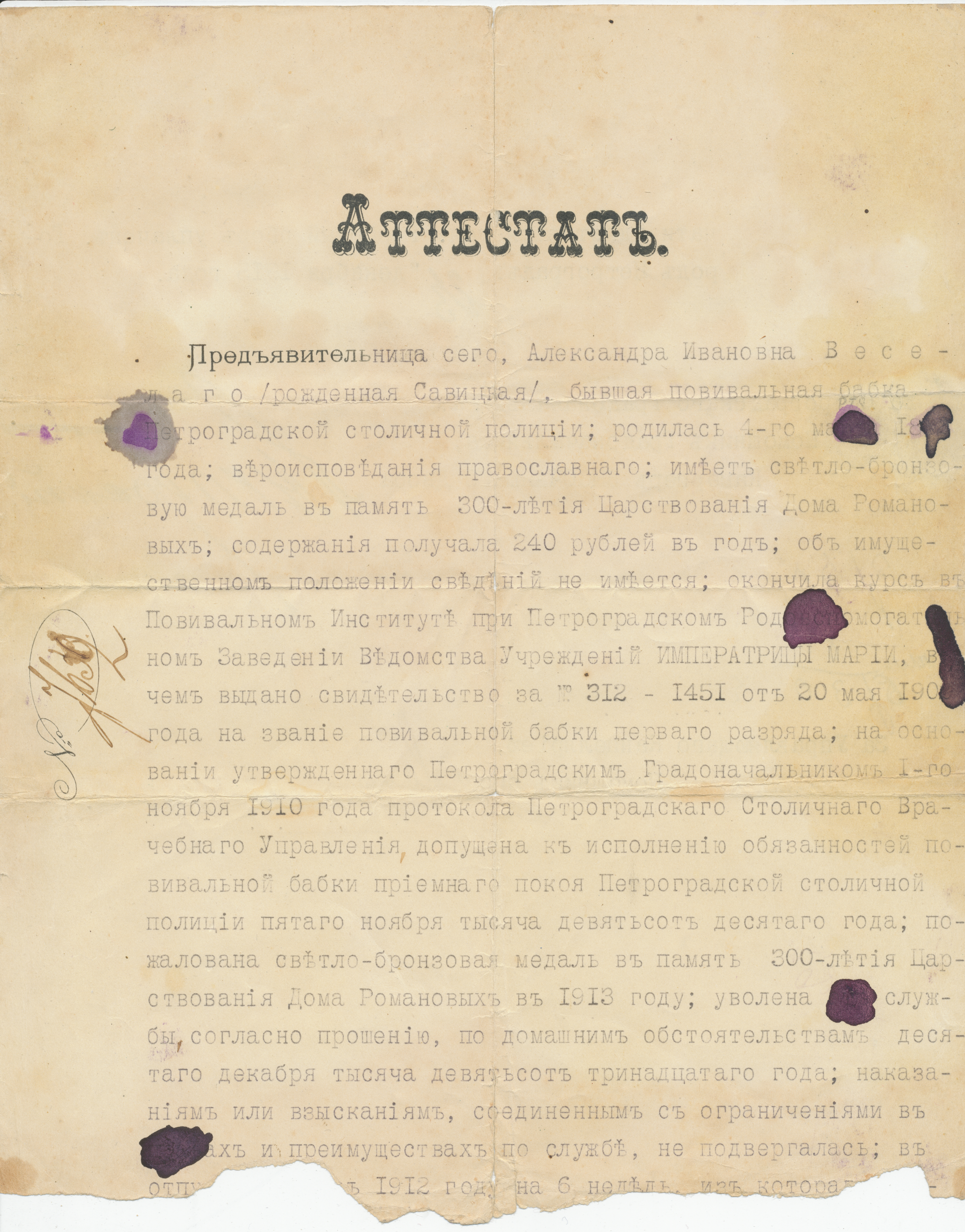 Аттестат бывшей повивальной бабки I-го разряда Петроградской столичной полиции Александры Ивановны Веселаго (урожд. Савицкой), окончившей курсы в Повивальном институте при Петроградском родовспомогательном заведении Ведомства учреждений императрицы Марии (так называемые Надеждинские курсы), выданный в 1915 году.